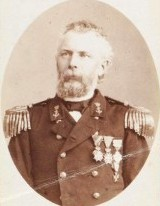 P. ten Bosch